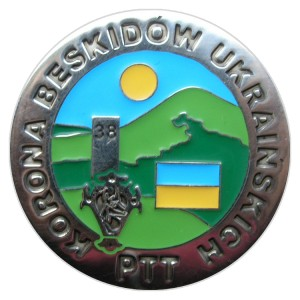 OKT PTT WKB UA